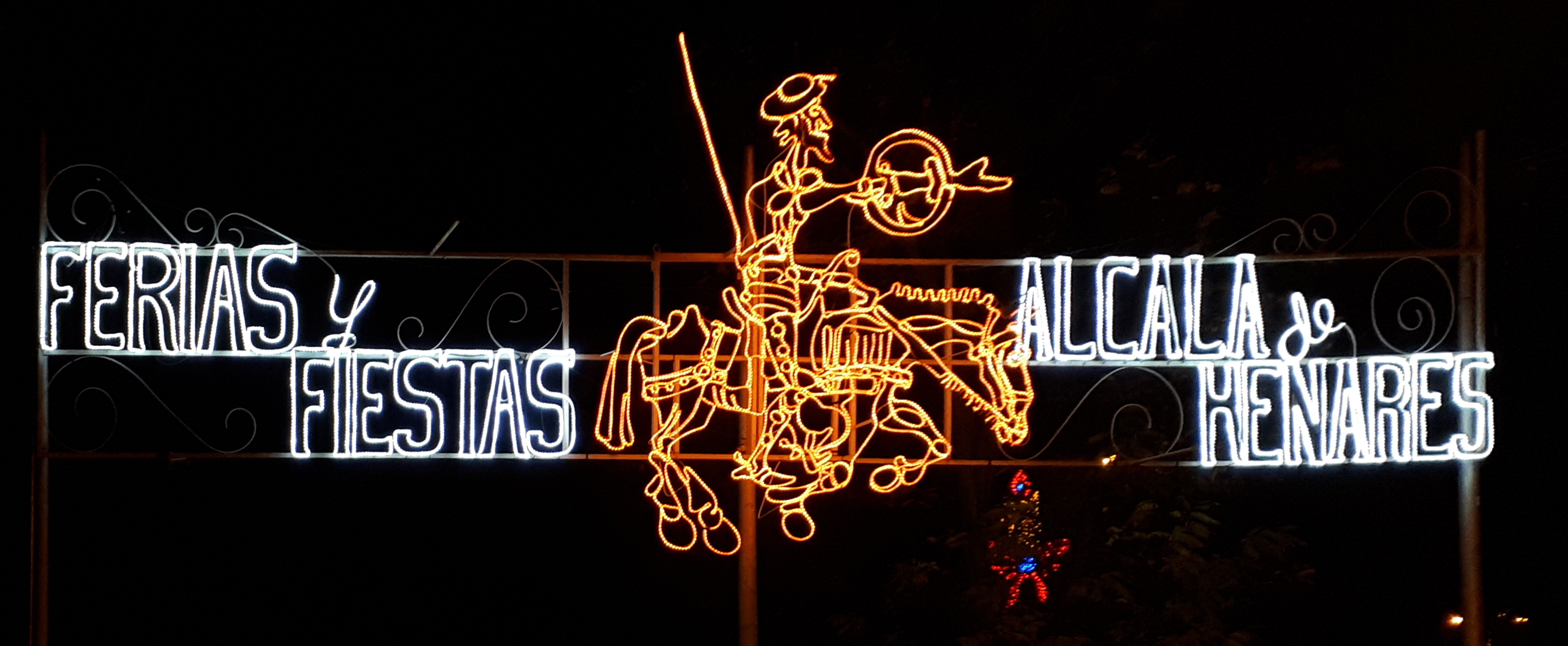 Cartel luminoso de las "Ferias y Fiestas" de Alcalá de Henares (Comunidad de Madrid - España) con la imagen de Don Quijote de la Mancha.